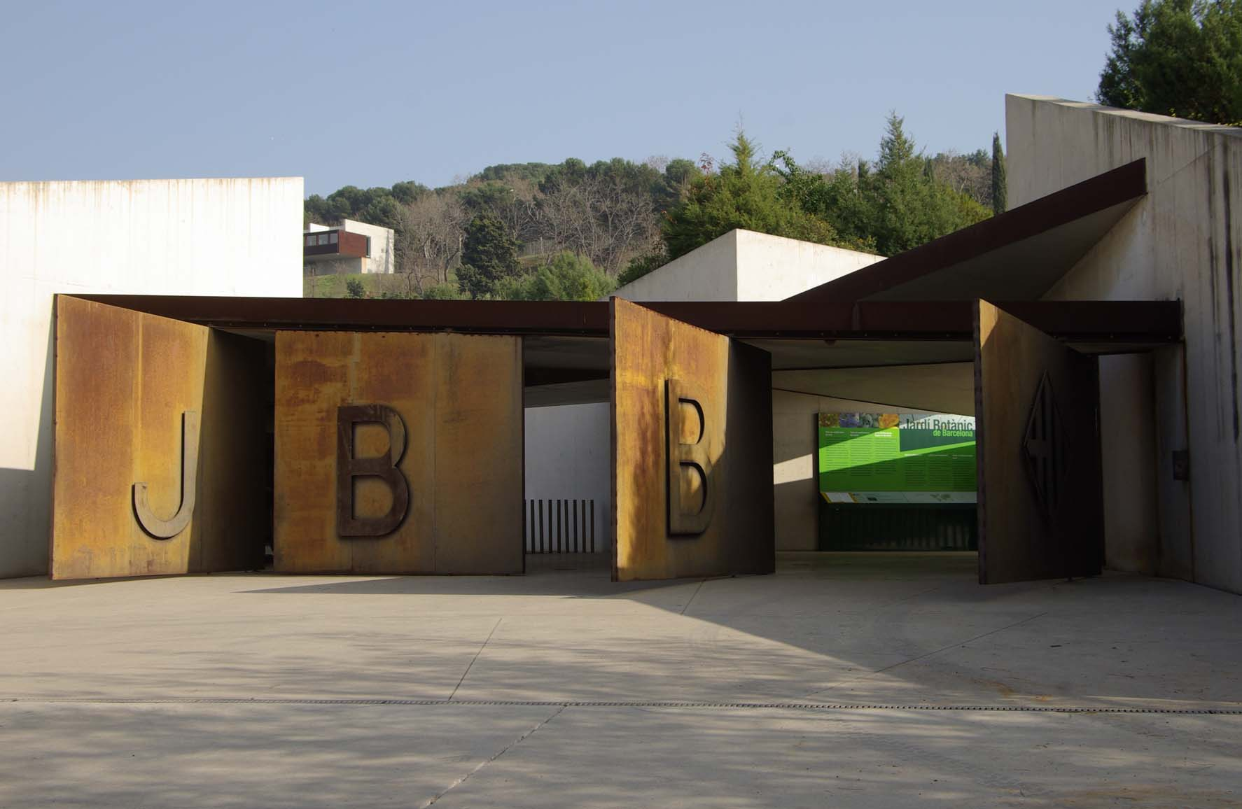 Entrance to the Jardín Botánico de Barcelona